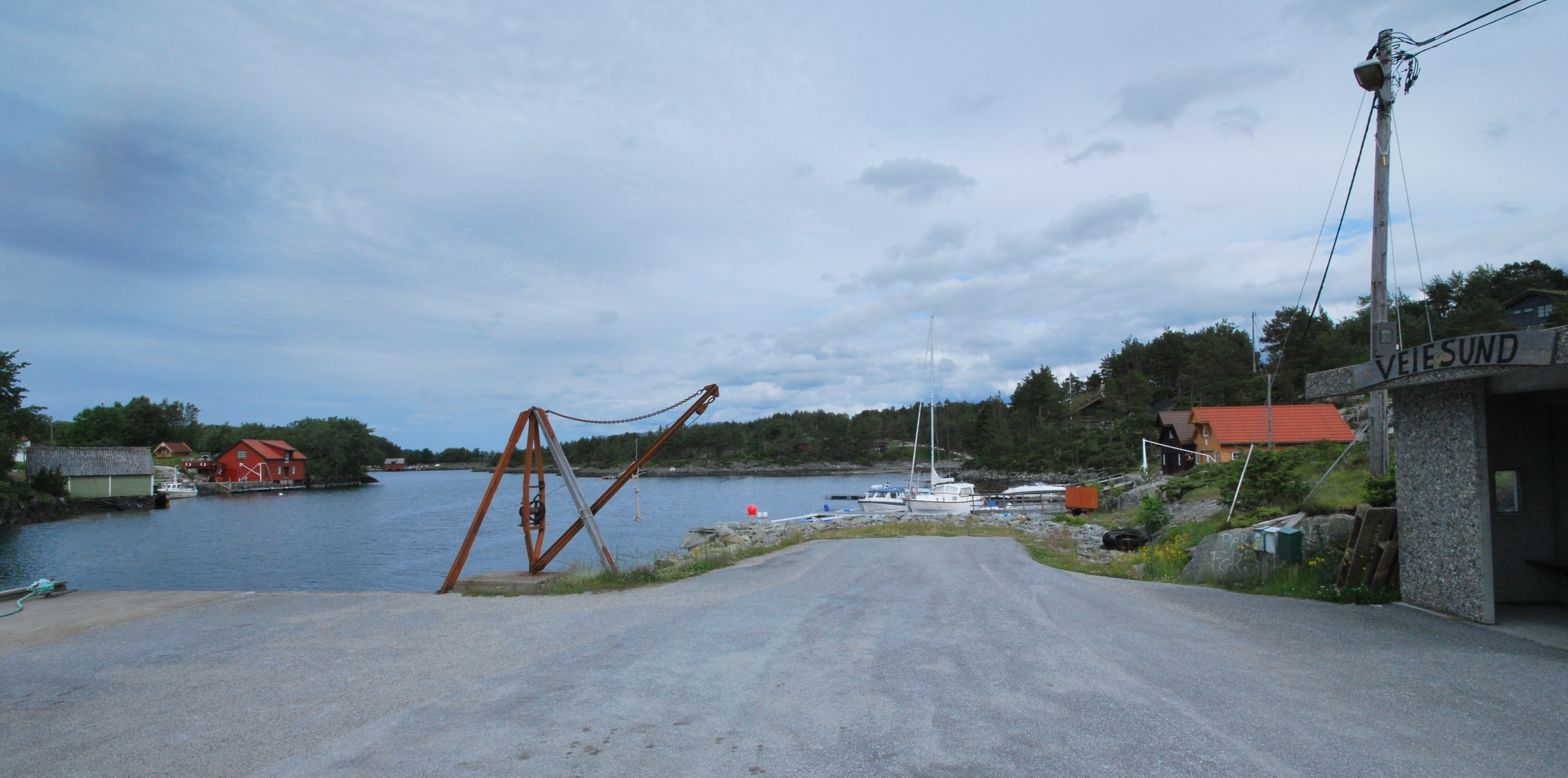 Veiesund, vest på Stavøy, Flora kommune